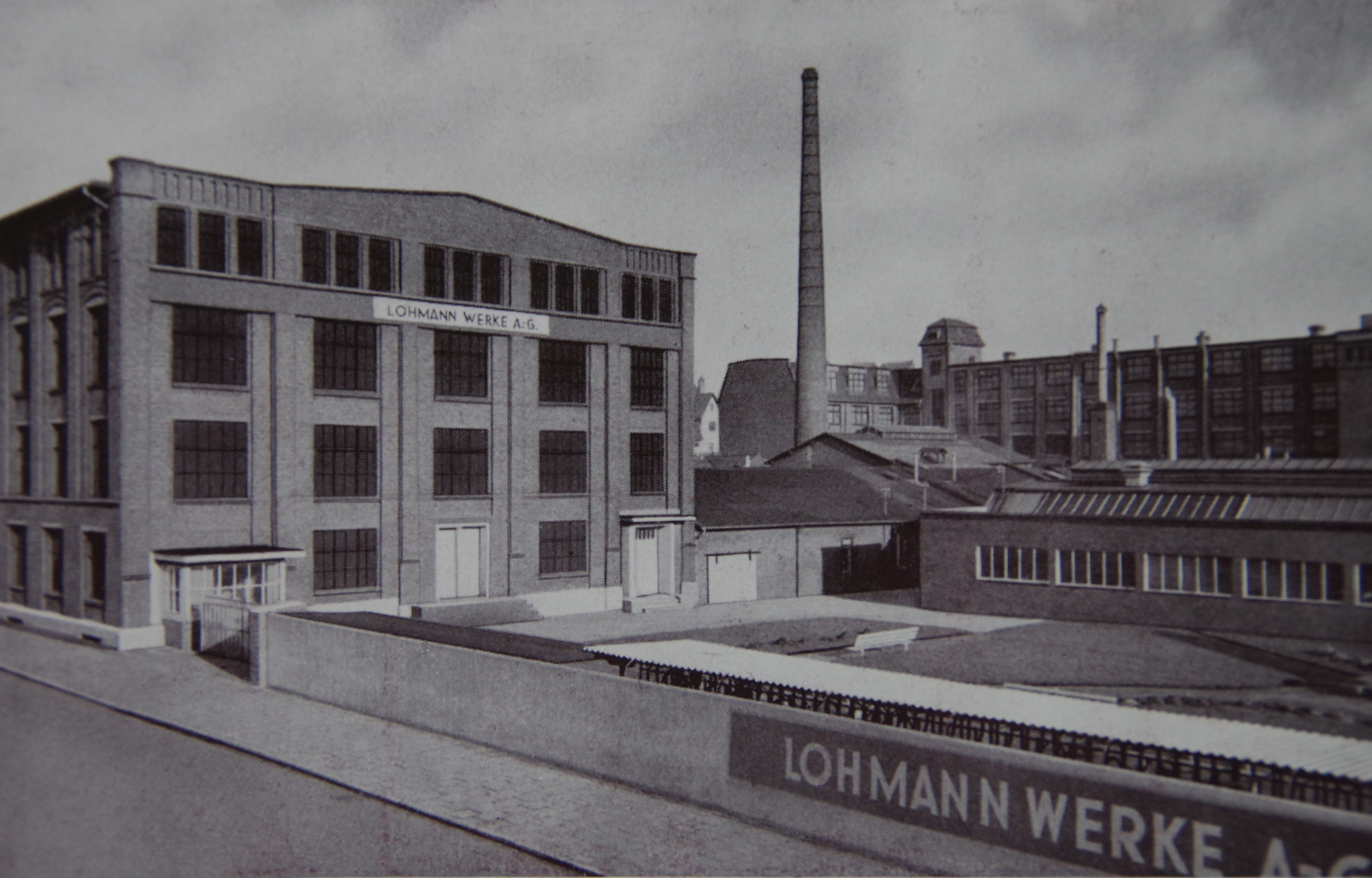 Das Bild stammt aus der Schrift zum 60ten Jubiläum, gedruckt bei 'Wilhelm Eilers jr.' Bielefeld